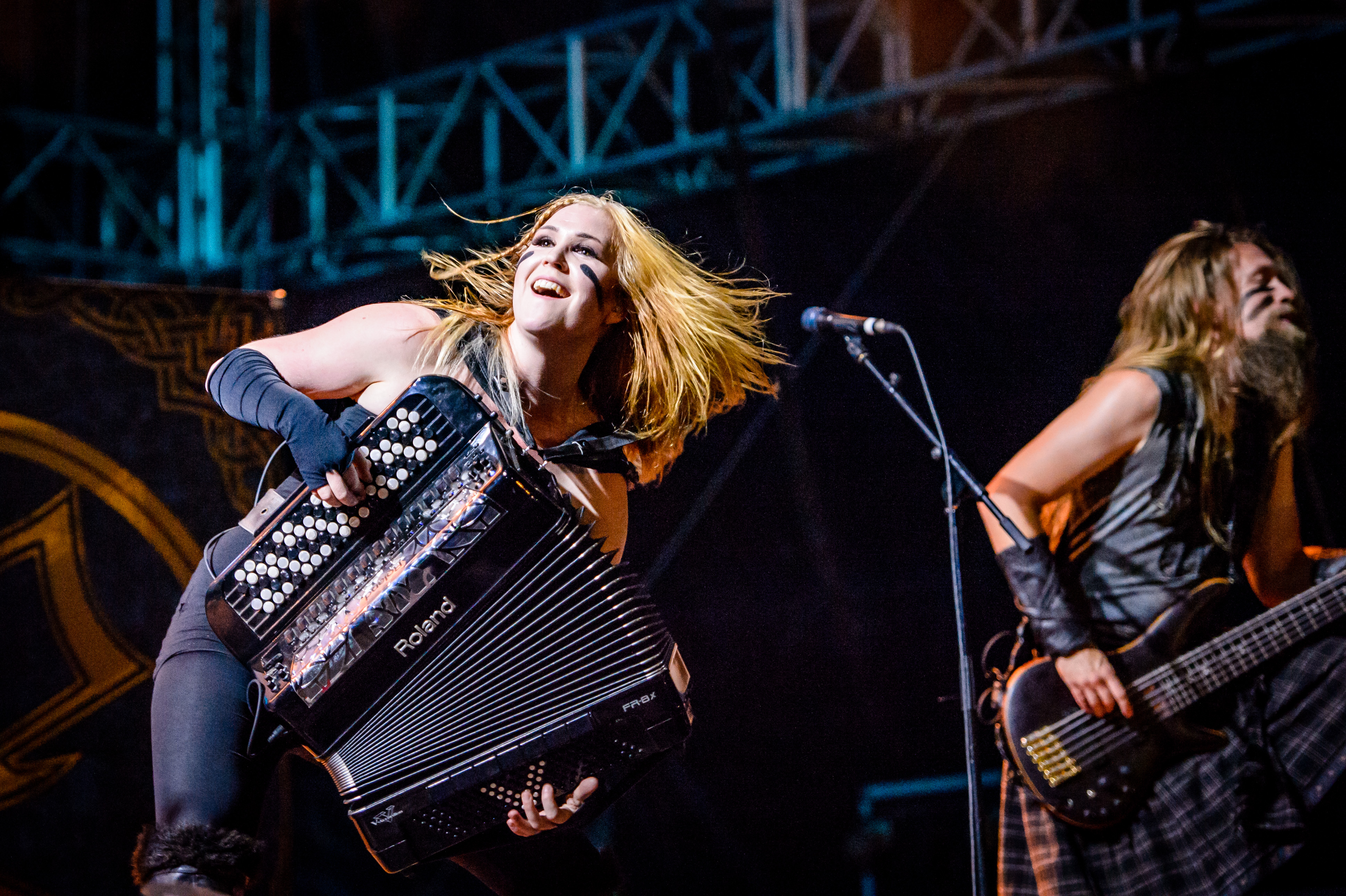 'Summer Breeze Festival 2017; Dinkelsbühl': 'Ensiferum'